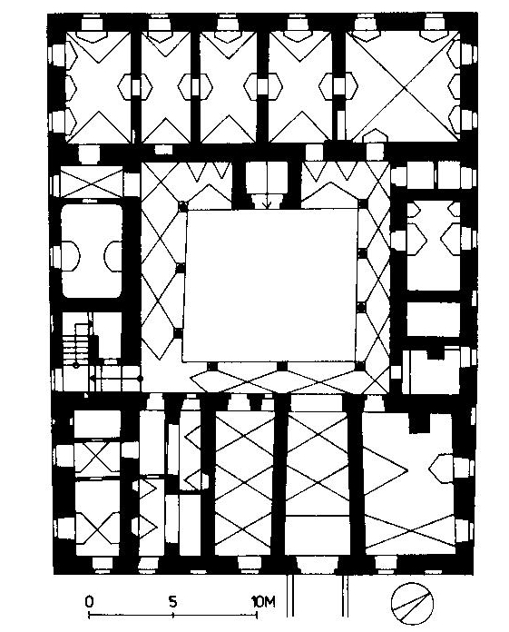 Grundriss des Schlosses in Unterdürnbach, Gemeinde Maissau